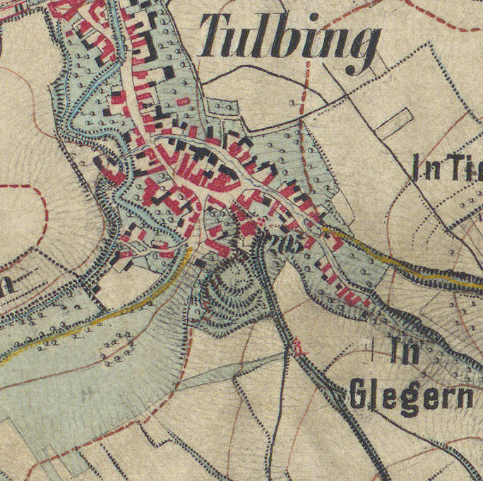 historische Landkarte: Gradkartenblatt Zone 12 Colonne XIV Section d3 (später 4656/4c). Königstetten, Chorherrn, Tulbing, Katzelsdorf, Nietzing, Kirchbach, Scheiblingstein im nordwestlichen Wienerwald bzw östlichen Tullnerfeld. Franzisco-josephinische (3.) Landesaufnahme der österreichisch-ungarischen Monarchie. Aufnahmeblatt 1:12.500. Aufgenommen 1872